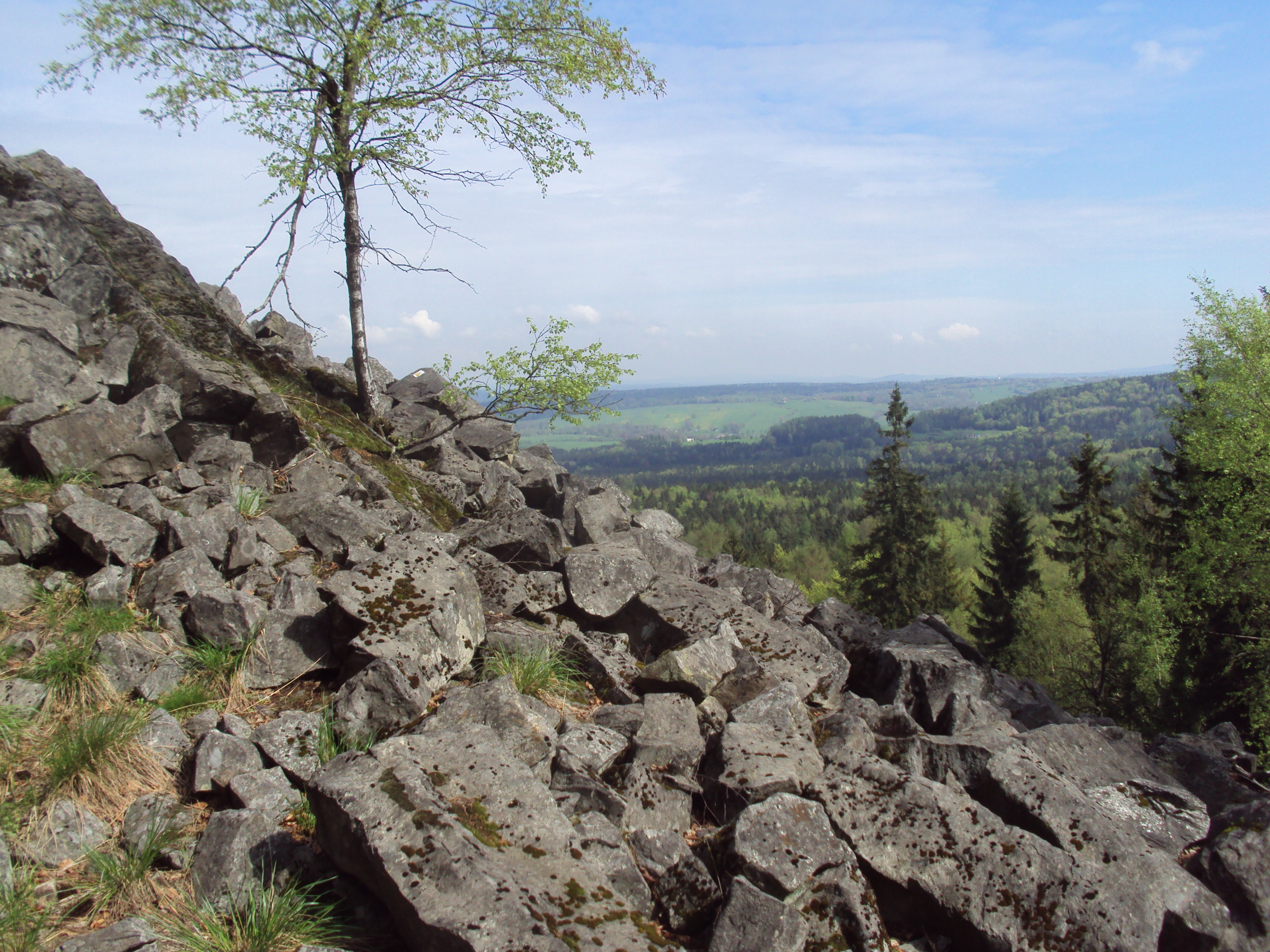 Suťové pole pod vrcholem